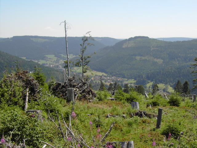 Blick auf Obertal (Baiersbronn), Deutschland